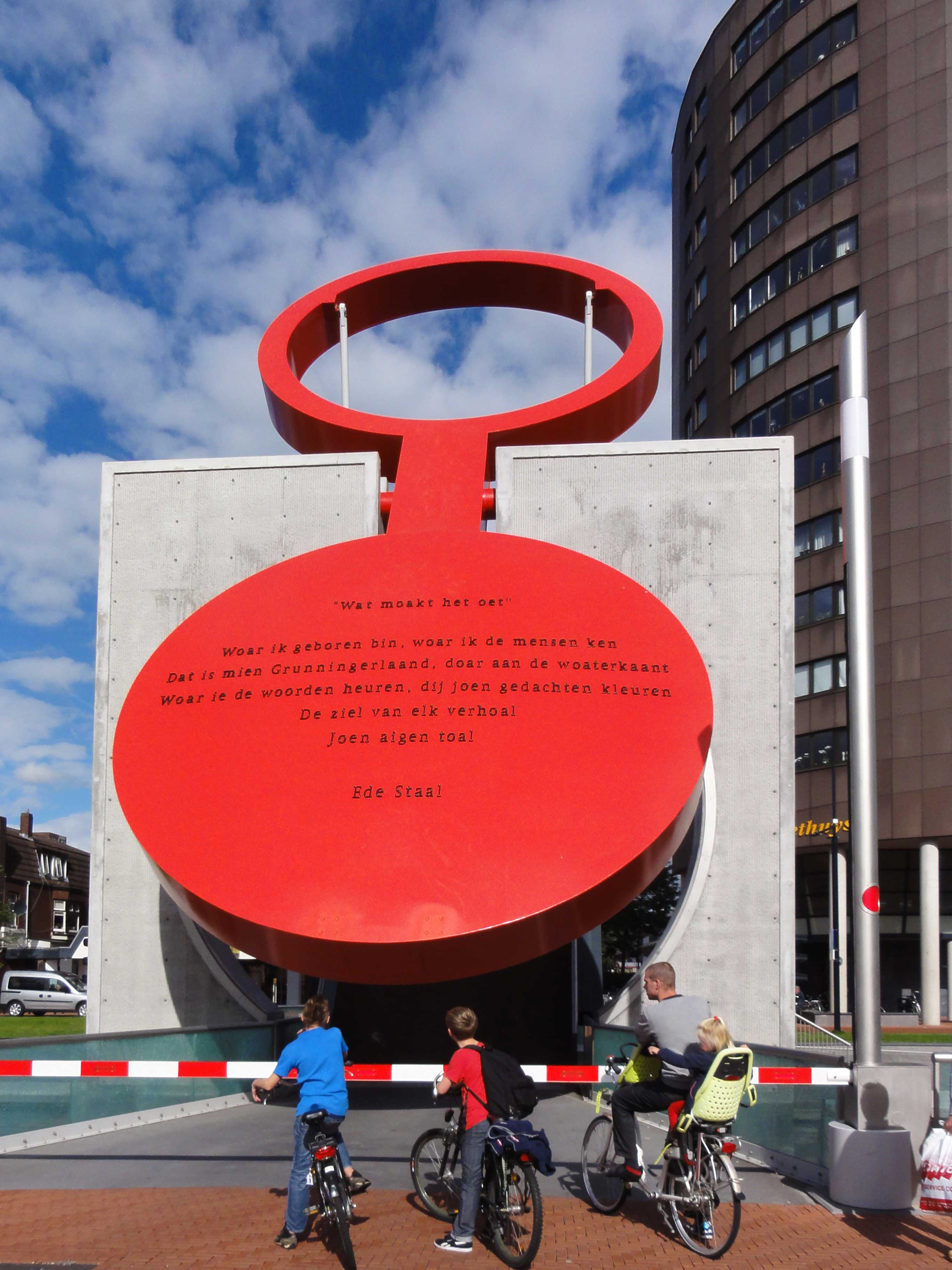 Eurobrug in Stadskanaal met een tekst van een gedicht van Ede Staal